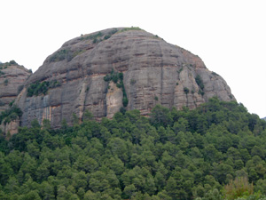 Castell de Bocs des de les Boades